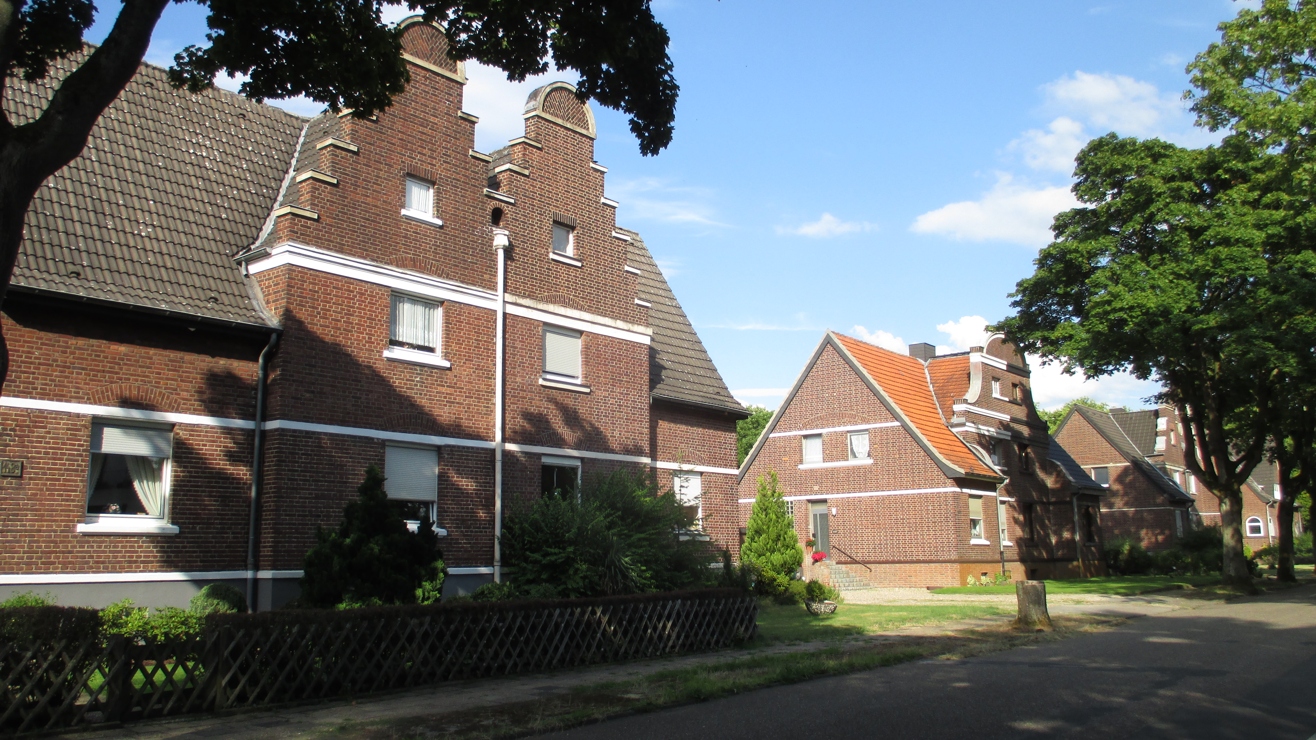 In der Beamtensiedlung wohnten die besser verdienenden Betriebsangehörigen der Zeche Friedrich Heinrich. Hier ein Ensemble der Siedlungshäuser an der Bertastraße.